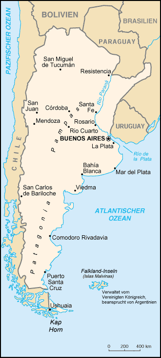 Karte Argentiniens